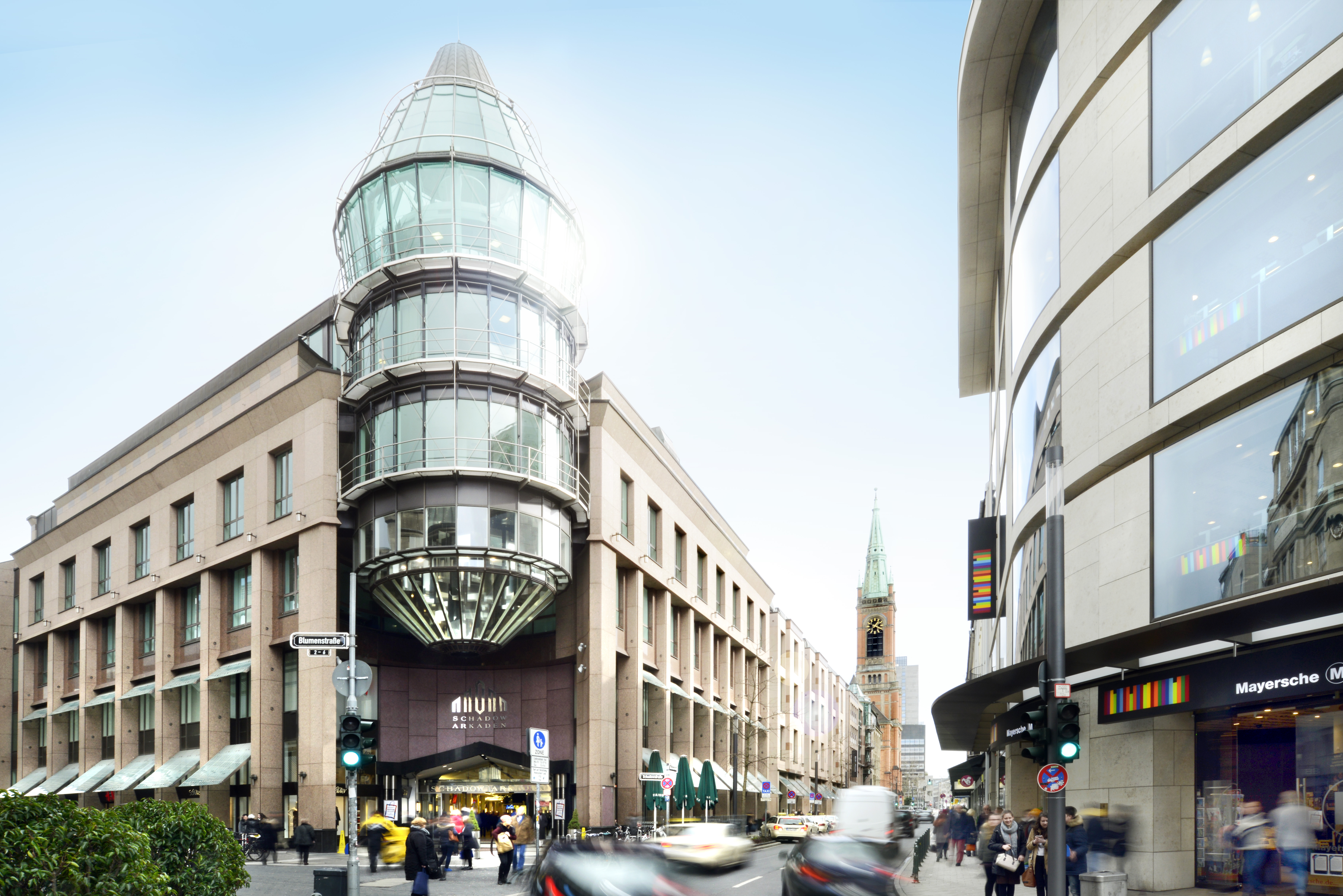 Schadow Arkaden Außenansicht, rechts die Blumenstraße mit Mayersche Buchhandlung (Königsallee 18)